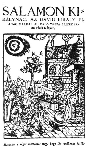 Salamon királynac, az David kiraly fianac Markalfal valo trefa beszedeknec röuid könyue. A második kiadás címlapja (Magyar Könyvszemle, 1896. 1. sz. 53. l.)